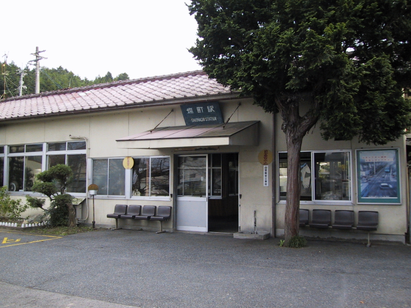 投稿者撮影